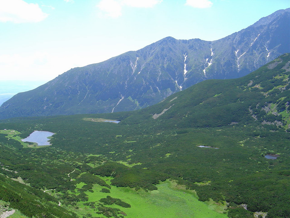 Dolina Bielych plies from Predné Kopské sedlo